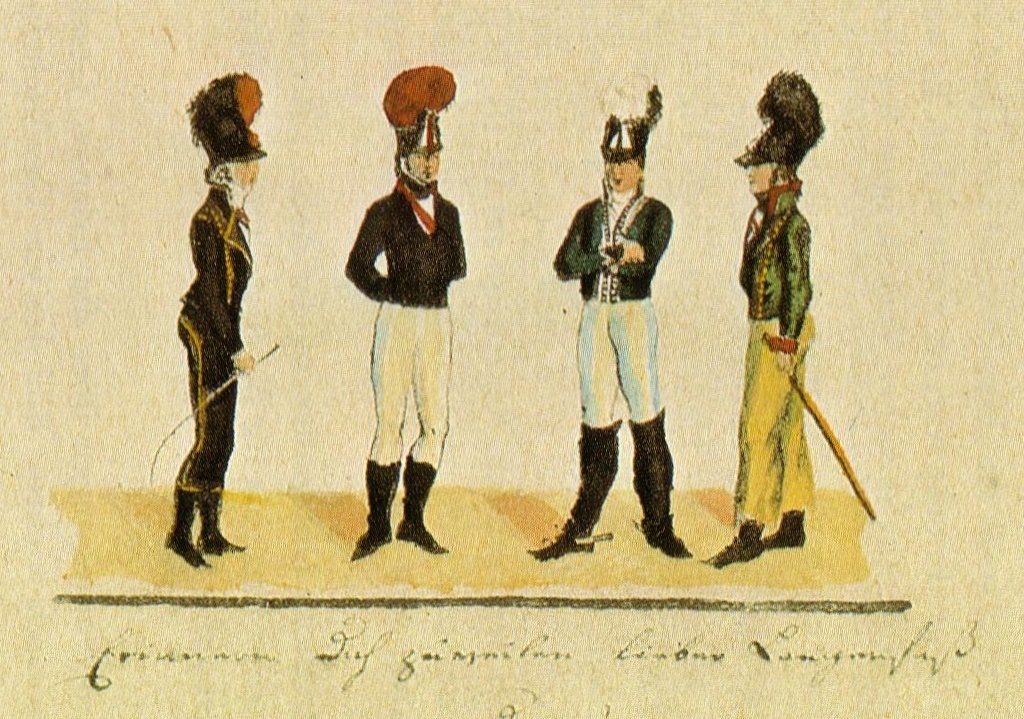 Ausschnitt aus einem Stammbuchblatt des Ansbachers Langenfaß, im Zweiten Weltkrieg verloren. Dargestellt sind die Senioren der 4 Erlanger Gesellschaften von 1801; von links nach rechts: Märker ("Berliner"), Ansbacher, Guestphale, Franke